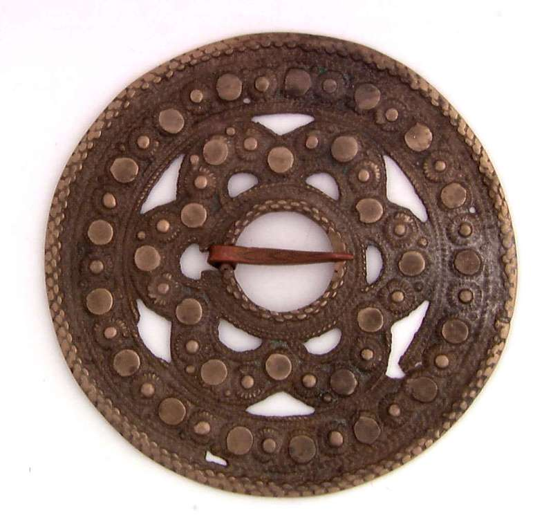 Støpt slangesølje i kobberlegering, innkommet fra Sauherad i Telemark. Foto Anne-Lise Reinsfelt / Norsk Folkemuseum, NF.1994-0070.